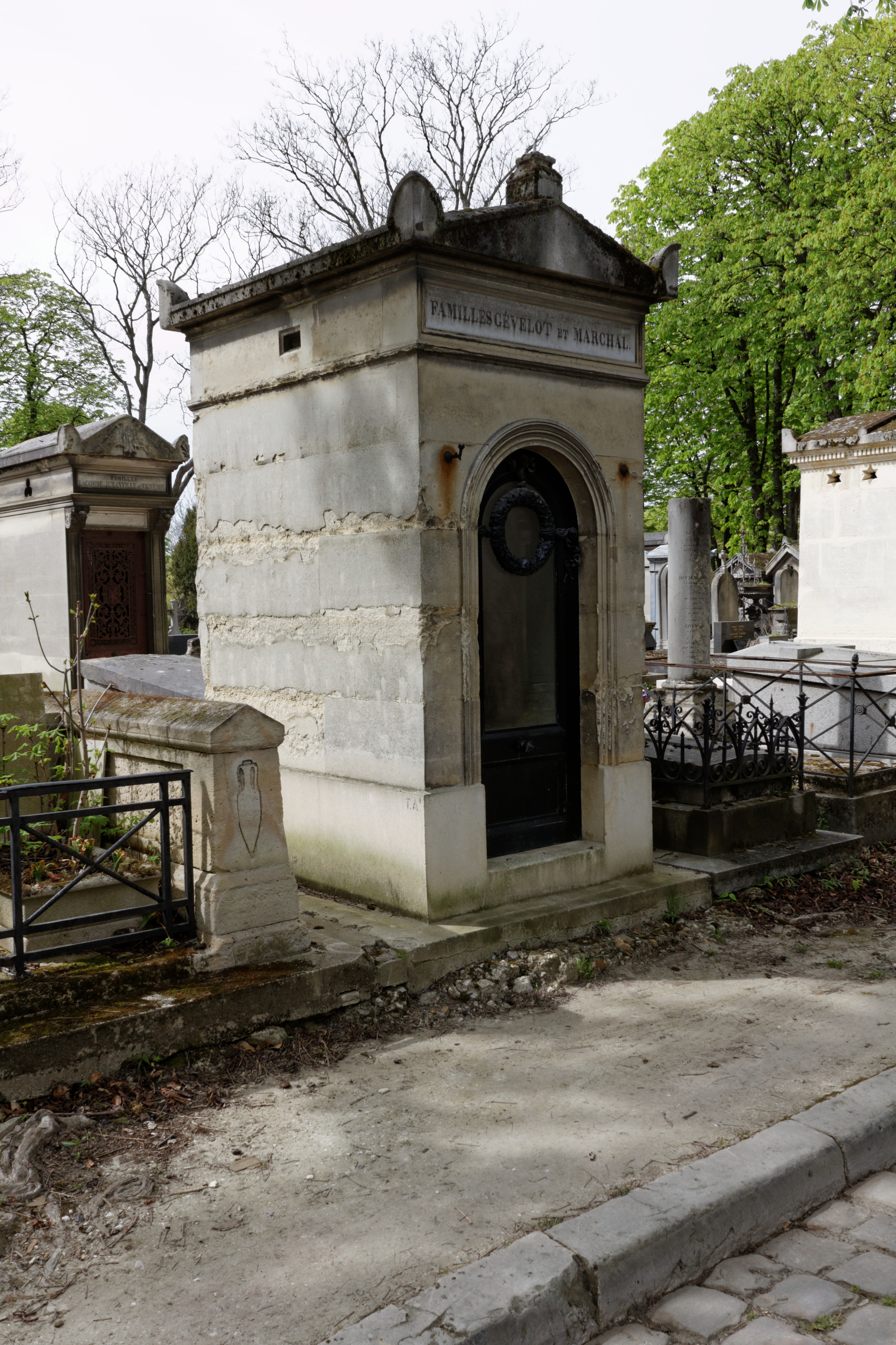 tombe